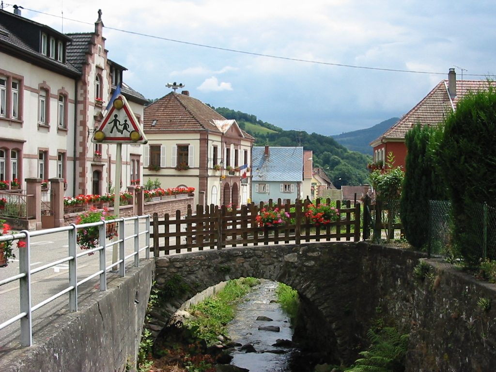 Fréland (Haut-Rhin). L'Ur et ses petits ponts près de la mairie.